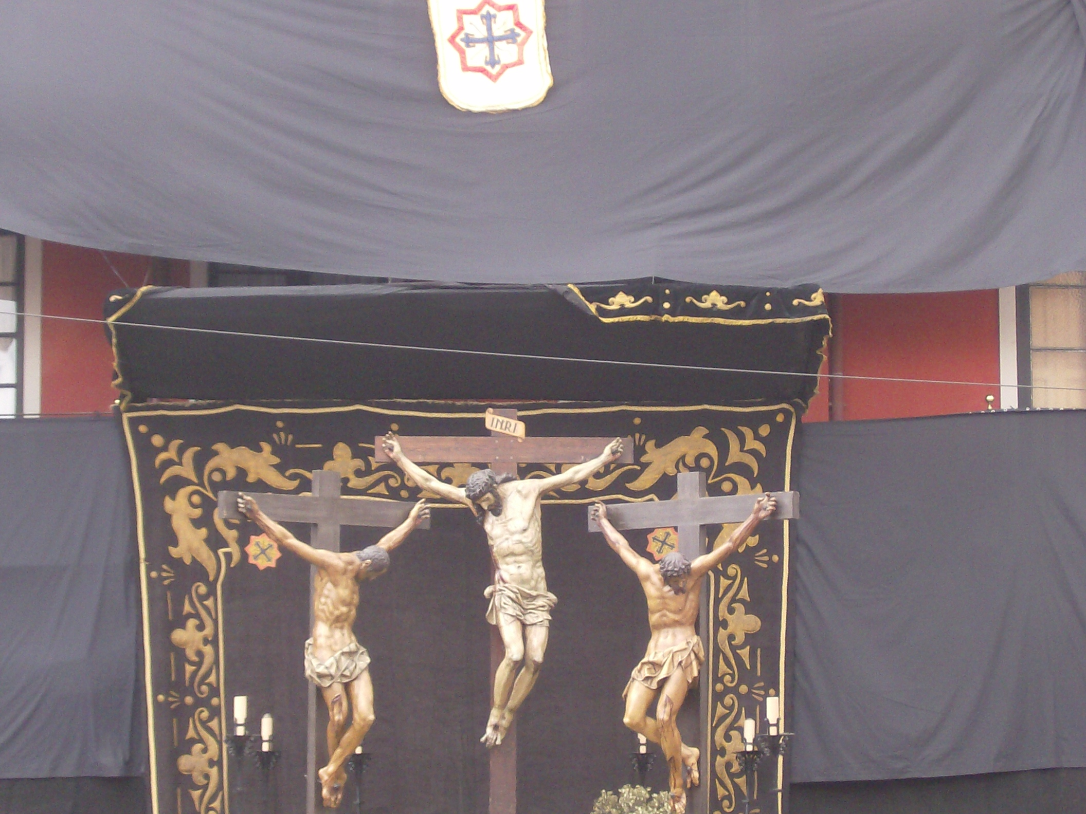 Plaza Mayor de Valladolid durante el Semón de las Siete Palabras